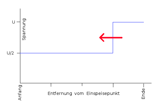 Spannungsverlauf längs eines Kabels, kurz nachdem eine angelegte Gleichspannung am offenen Kabelende reflektiert wurde. Die Sprungstelle läuft zum Kabelanfang zurück.